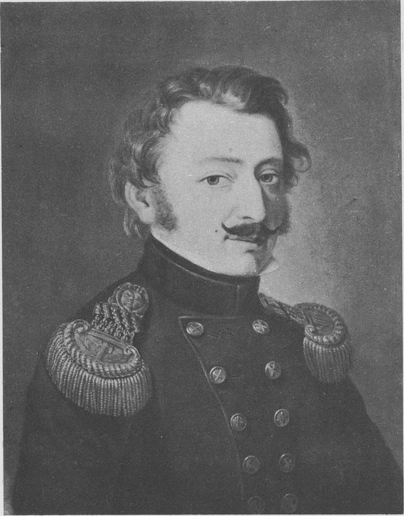 Kaptein Gerhard Munthe d.y. Ca. 1817.